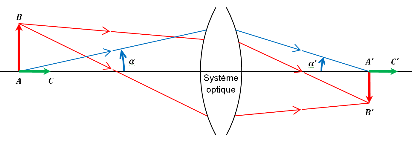 Figure permettant de présenter les formules de grandissement dans le cas d'un système optique objectif